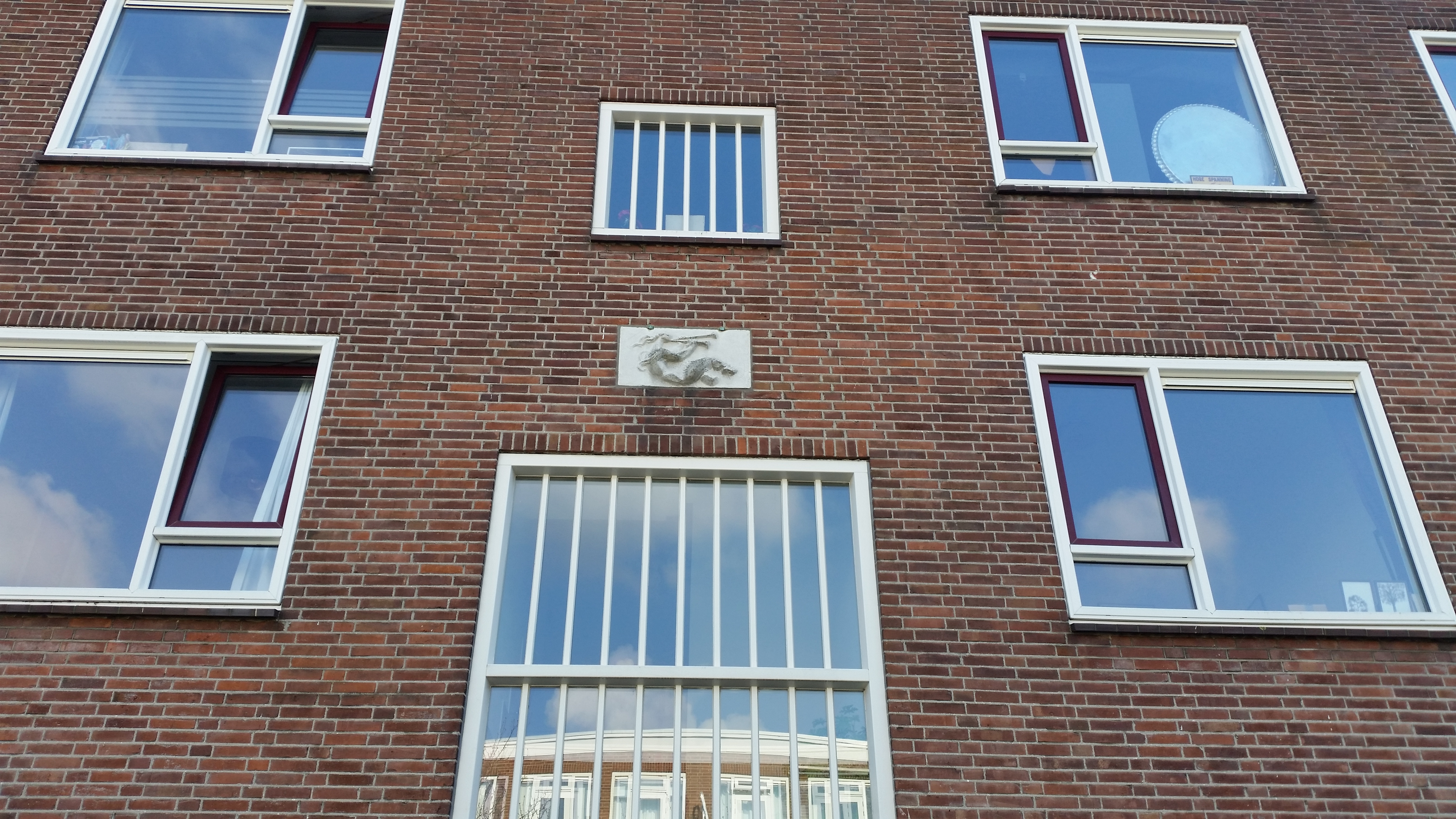 Impressie van de Rutherfordstraat, Amsterdam-Watergraafsmeer (maart 2020)